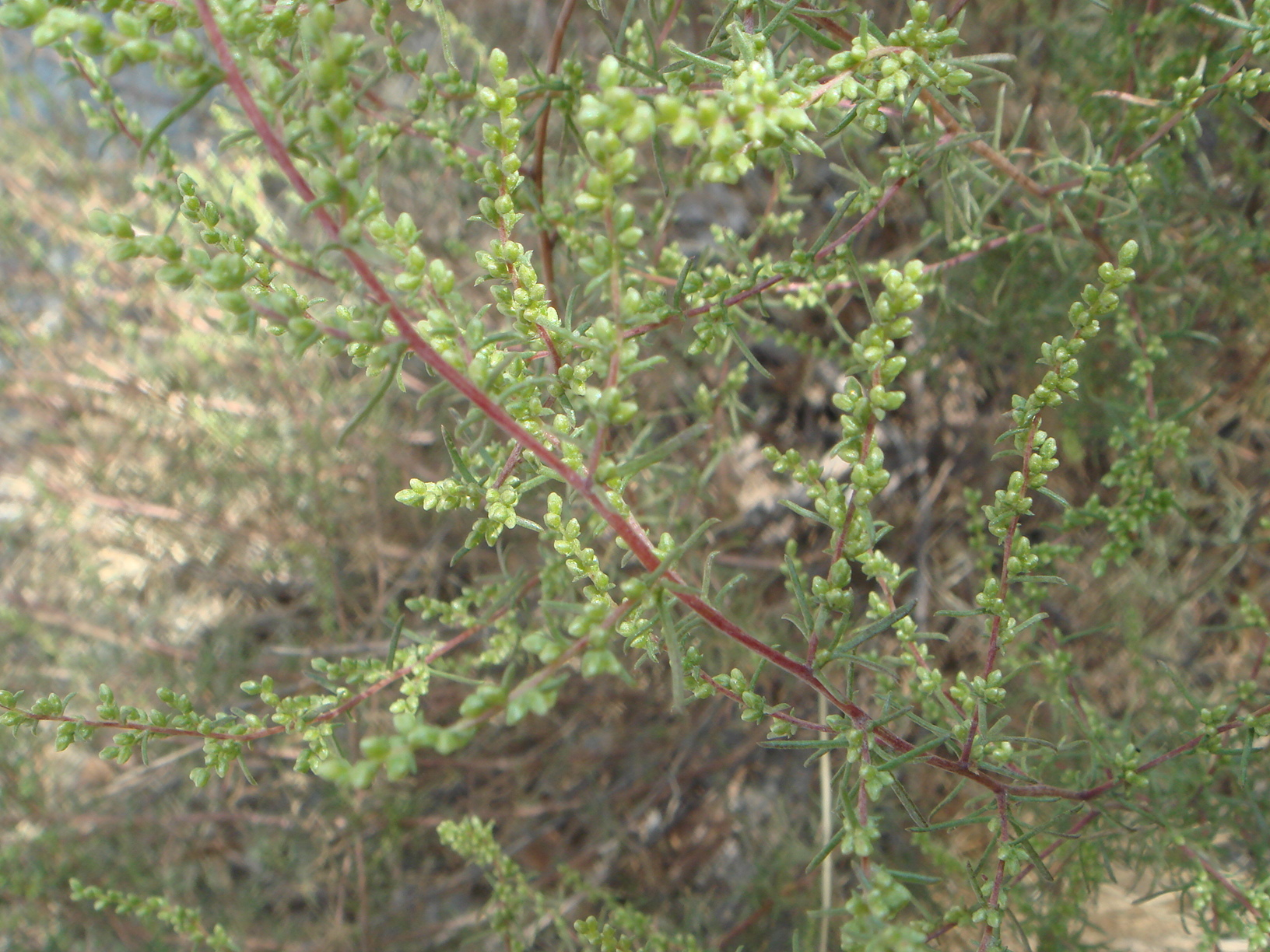 Artemisia campestris, Villatoro, (Ávila), España